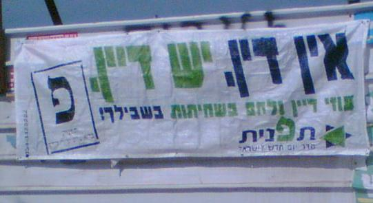 כרזת בחירות של תפנית. צילם דוד שי.